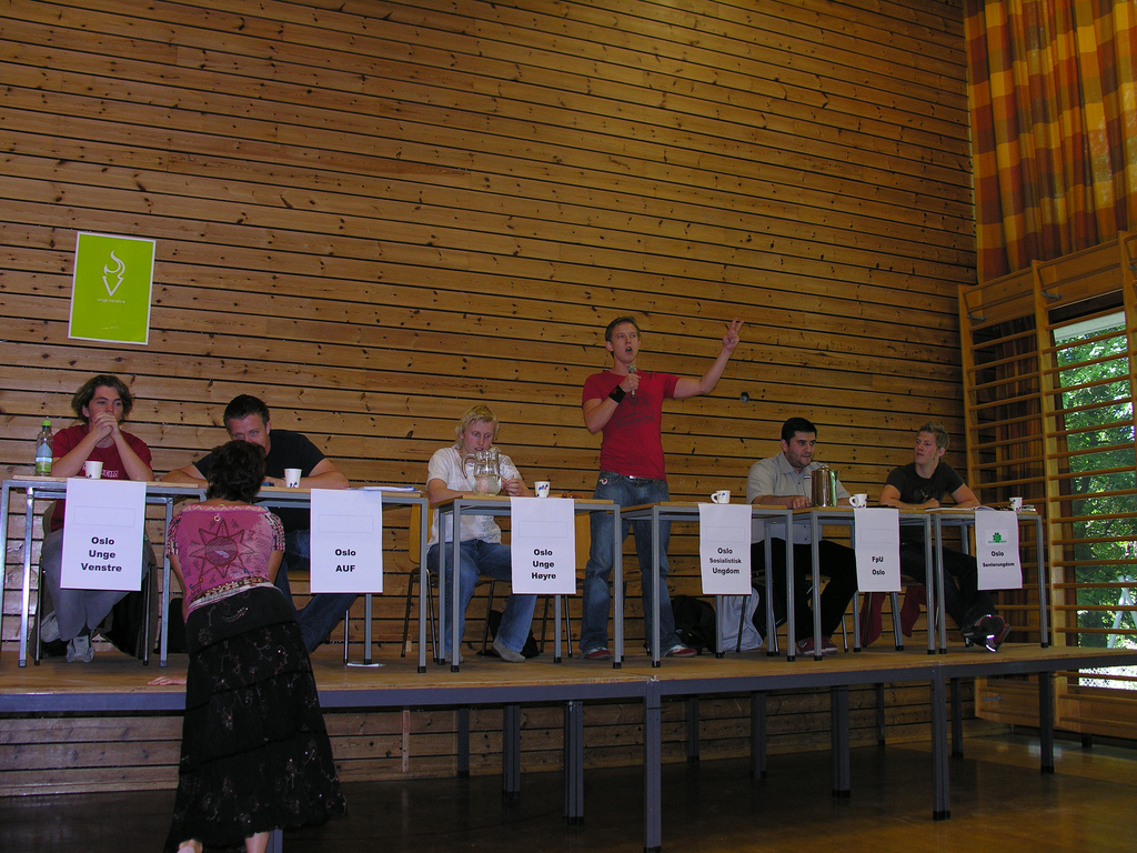 Skoledebatt under kommune og fylkestingsvalget 2007 i Oslo